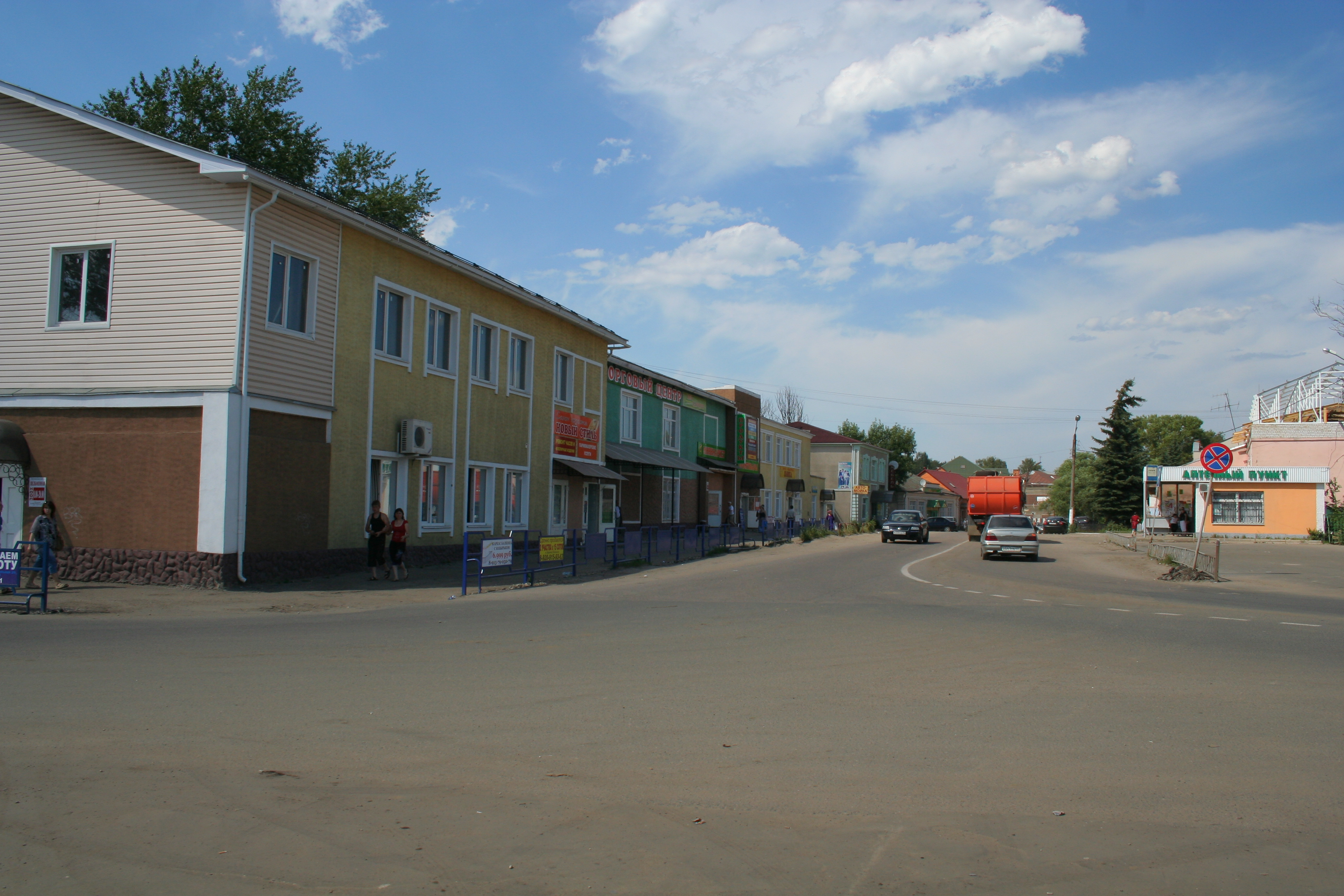 Eine Straße in Petuschki, Oblast Wladimir, Russland.